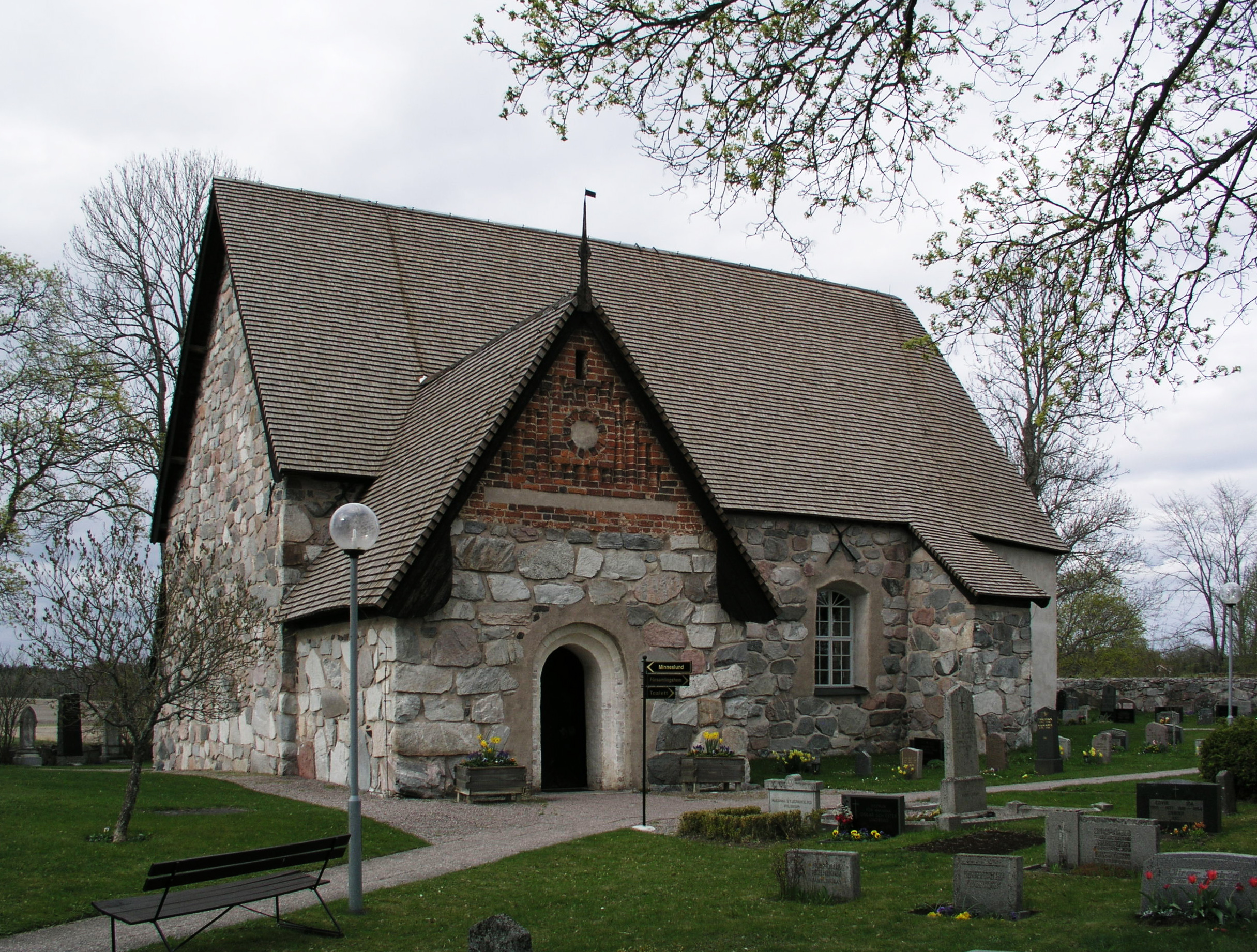 Rö kyrka, Norrtälje kommun, Diocese of Uppsala, Sweden